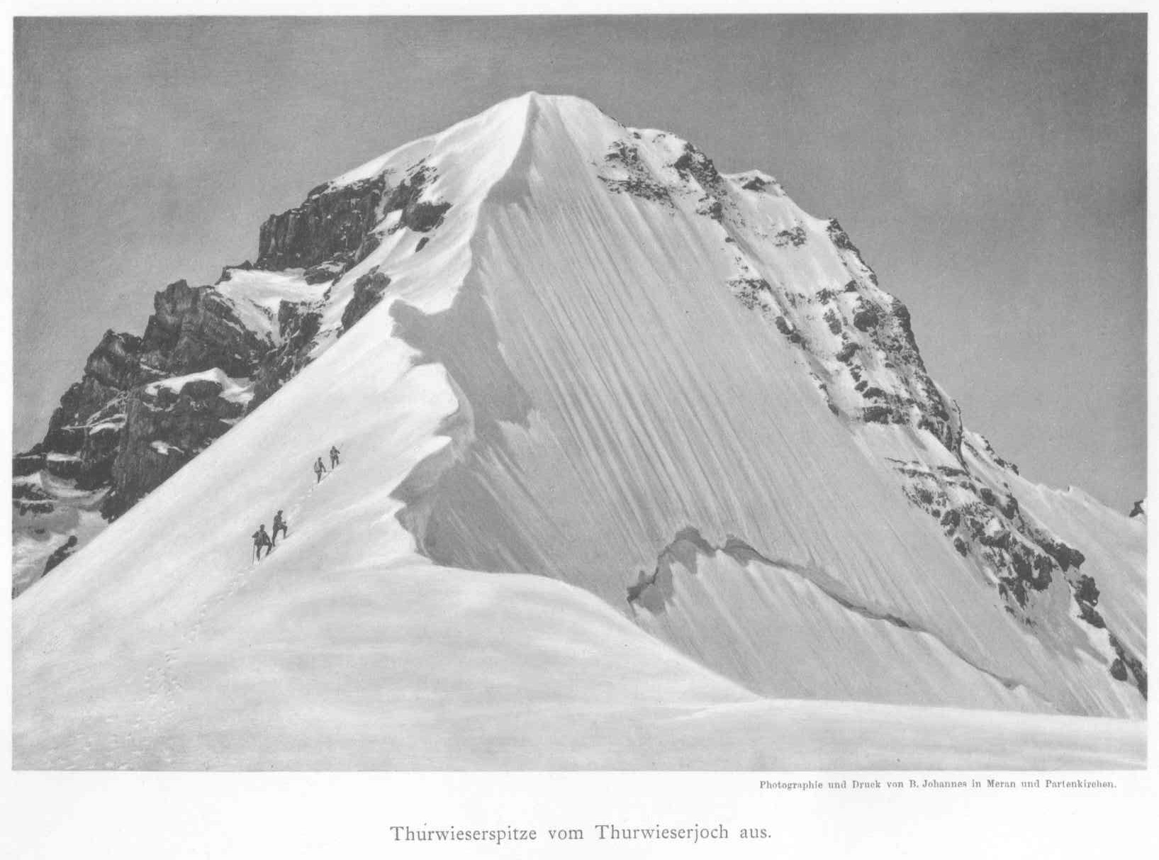 Thurwieserspitze about 1890